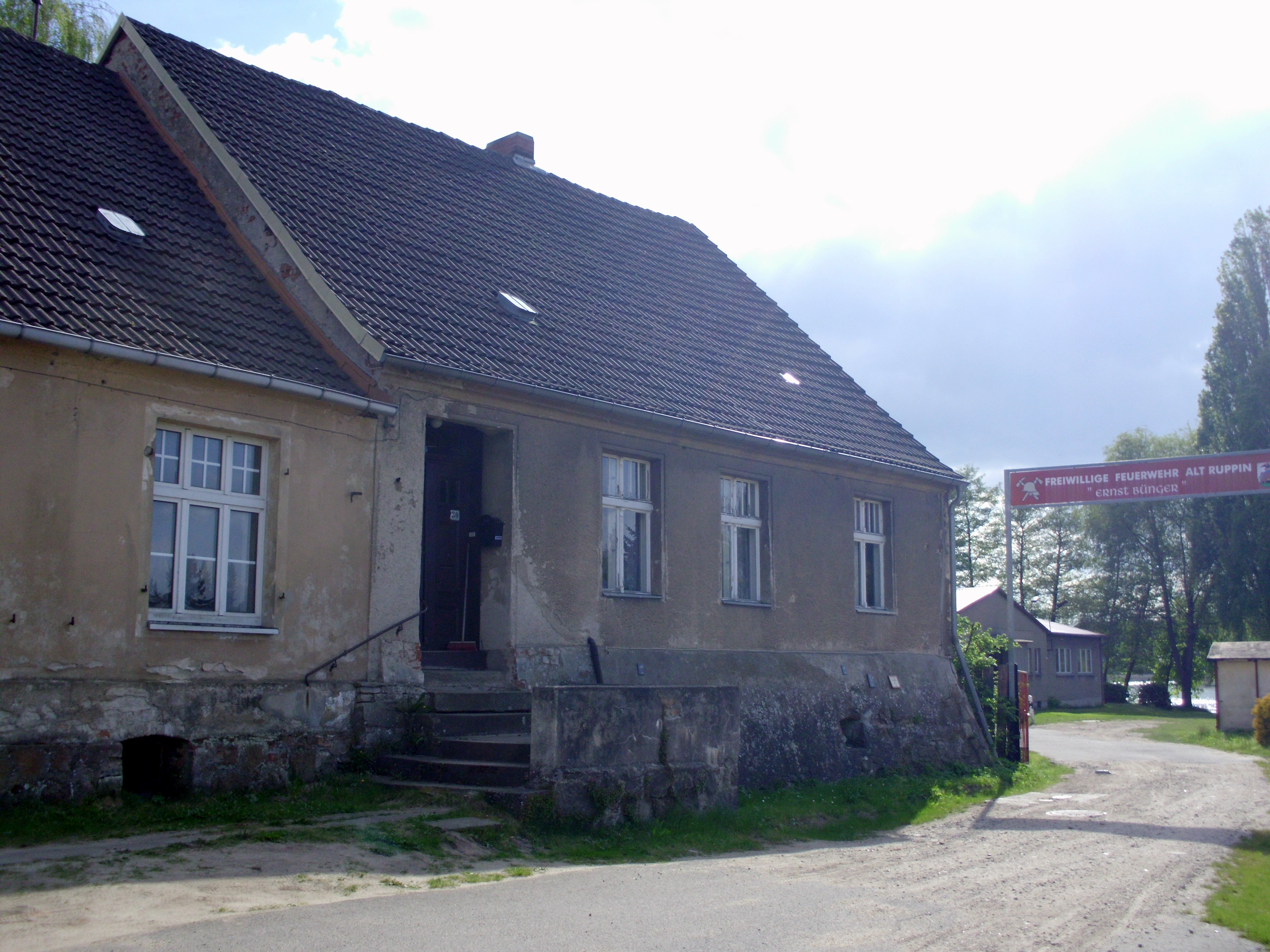 Ortsteil Alt Ruppin, Friedrich-Engels-Straße 30, an der Freiwilligen Feuerwehr, Neuruppin, Brandenburg, Deutschland